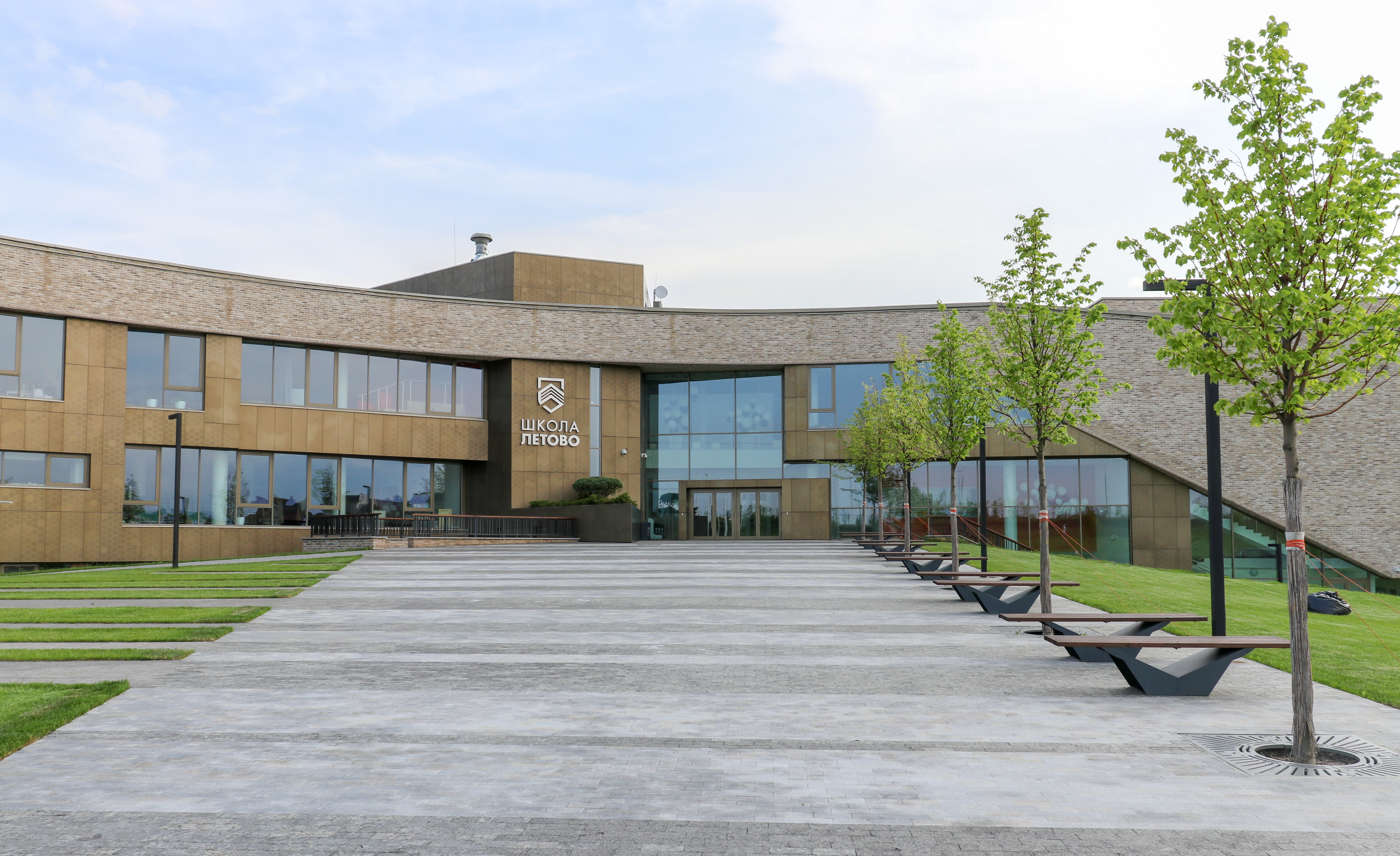 Школа «Летово»